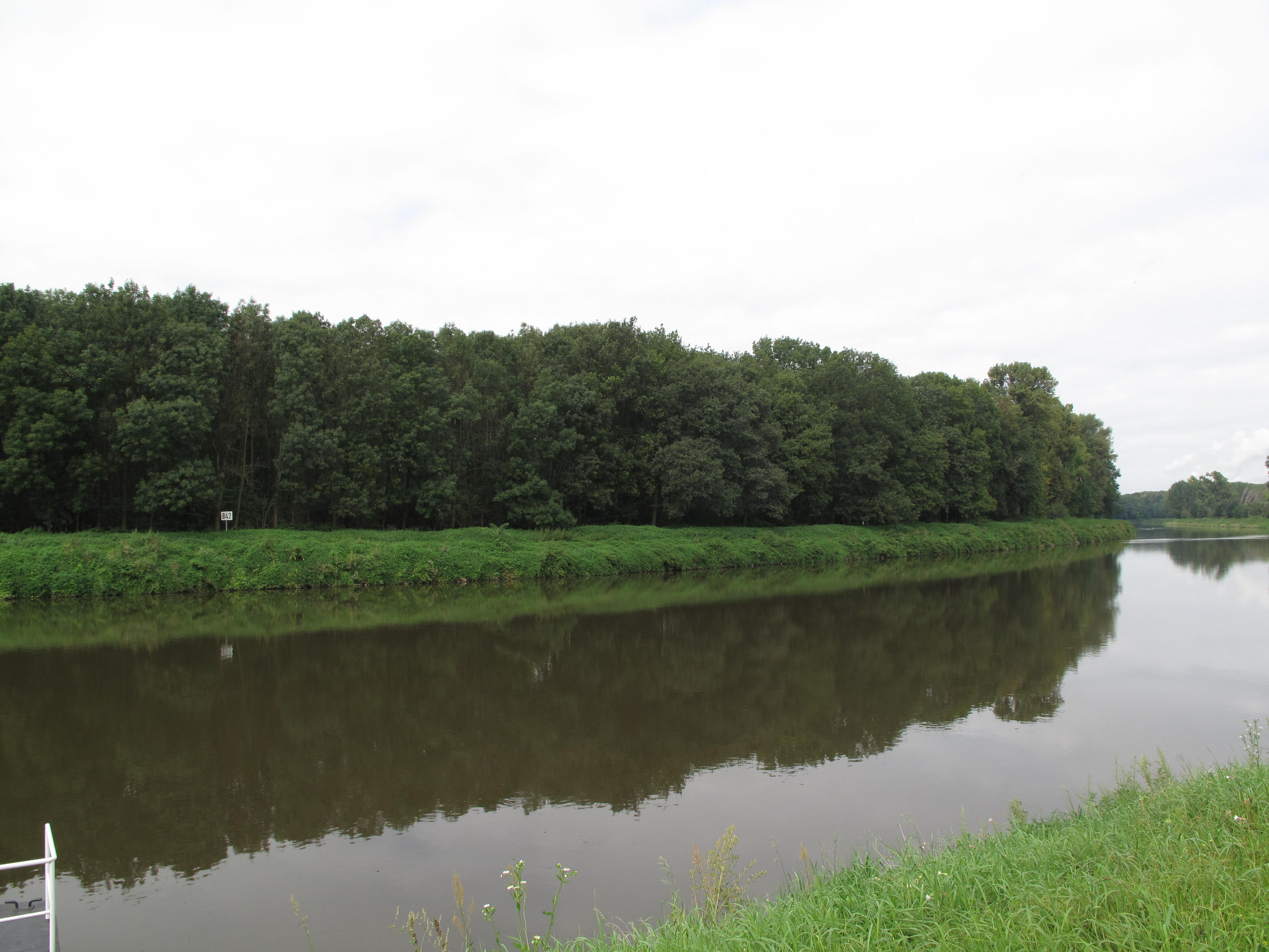 Úpor focený z druhé strany Labe